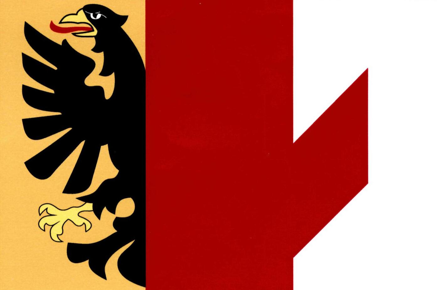 Vlajka obce Čakovičky